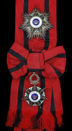 Decorazioni dell'Ordine dei Due Fiumi